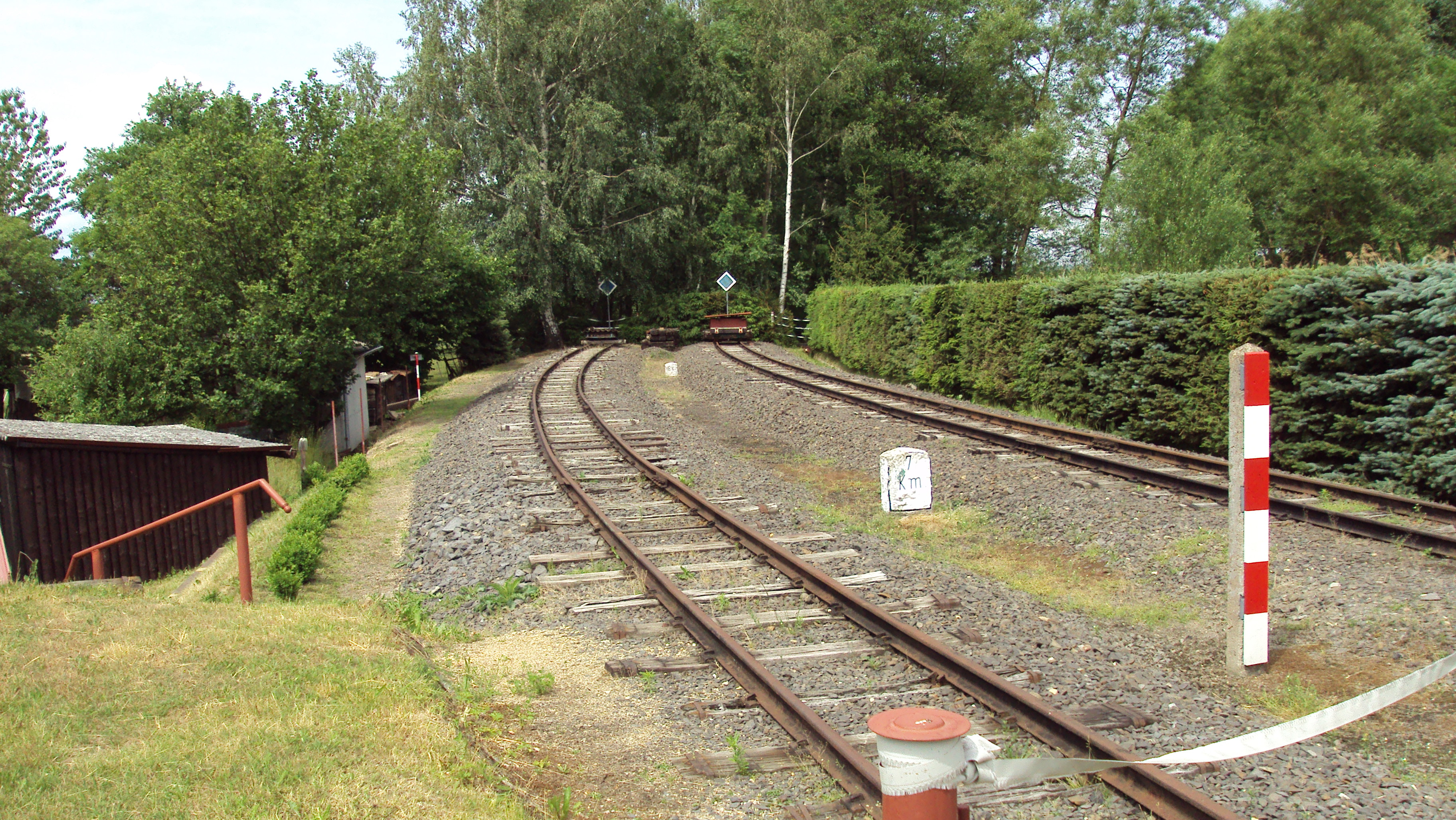 Kolejiště na zrušené úzkorozchodné trati Frýdlant v Čechách - Heřmanice na vjezdu do úvraťové stanice v Dětřichově. Pozemek pod kolejemi patří soukromému vlastníkovi (katastrální území Dětřichov u Frýdlantu, číslo parcely 1877/4)